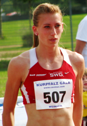 Beatrice Marscheck beim DLV-Olympia-Testwettkampf 2012 im Sepp-Herberger-Stadion Weinheim.